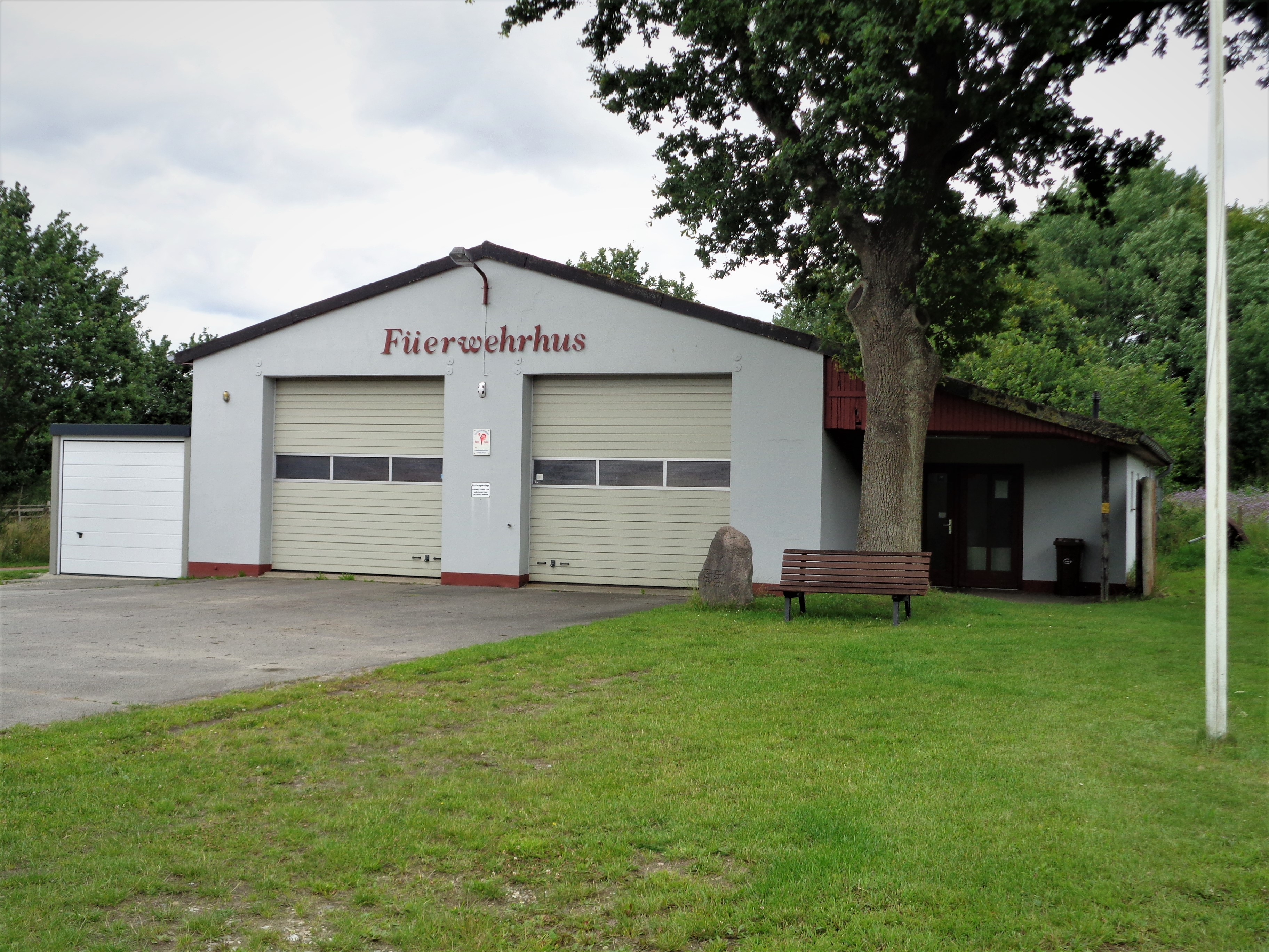 Feuerwehrhaus der Freiwilligen Feuerwehr Kochendorf, Gemeinde Windeby. Beschriftung in plattdeutscher Sprache.